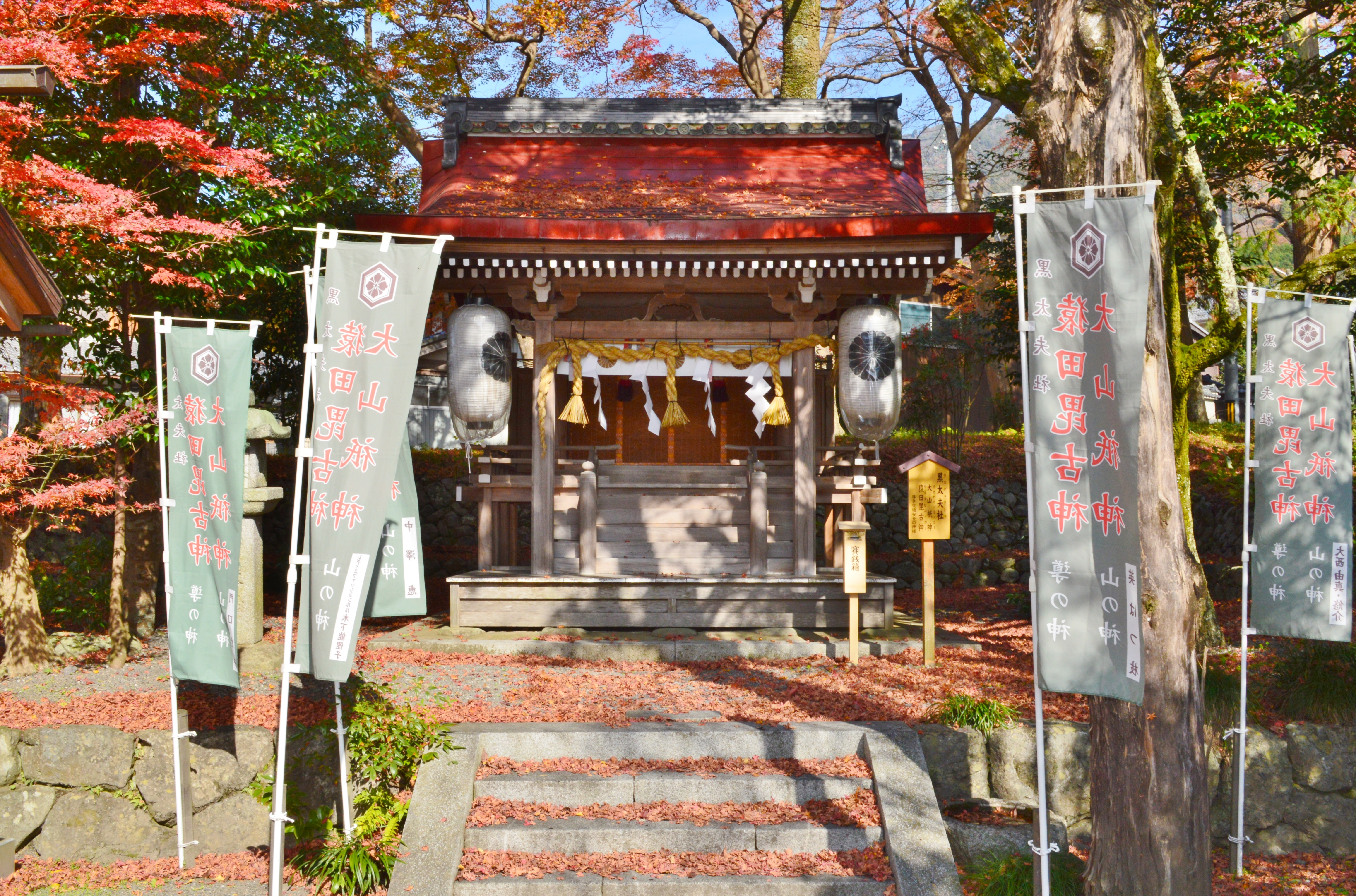 黒太夫社 (出雲大神宮境外社)